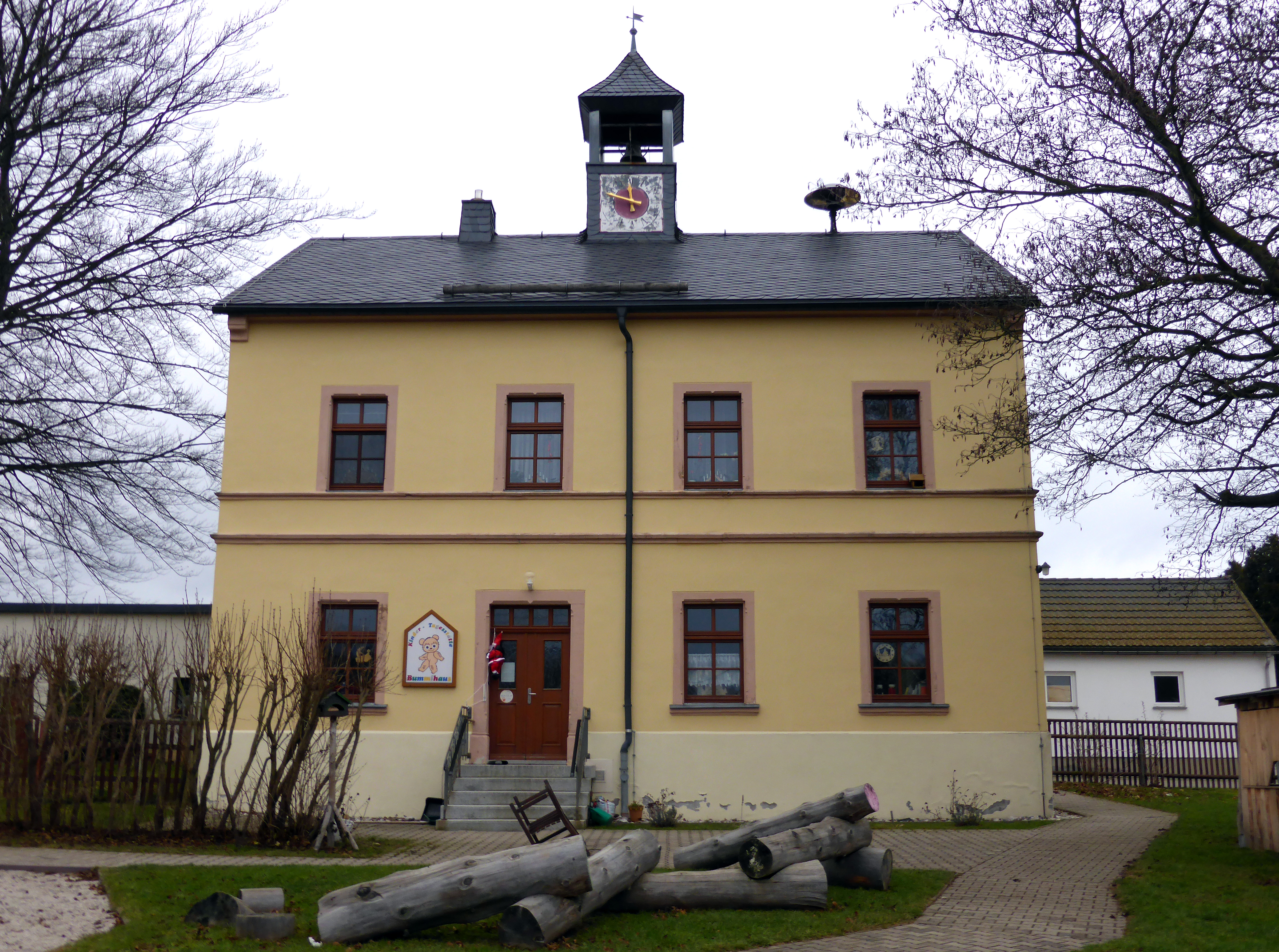 Ehemaliges Schulgebäude in Lauta (Marienberg) (Gartenstrasse), Erzgebirgskreis - Sachsen.